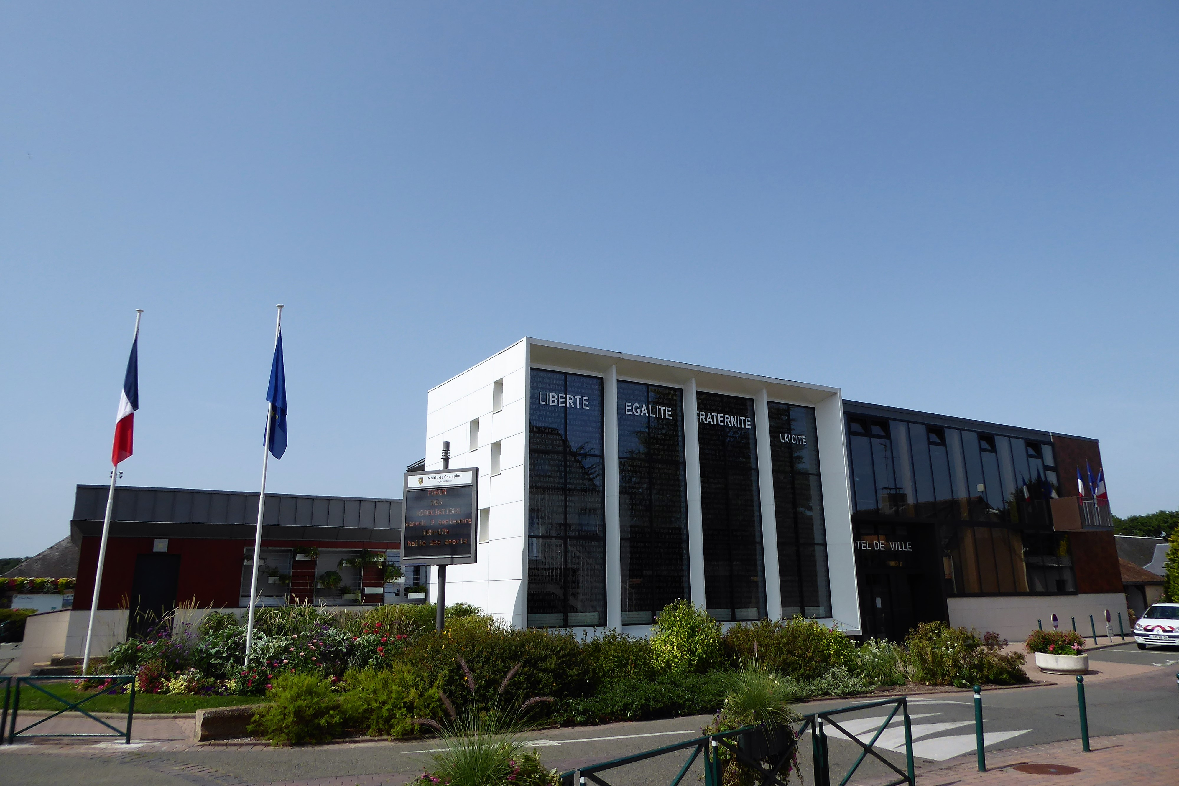 L hôtel de ville de Champhol, Eure-et-Loir (France).